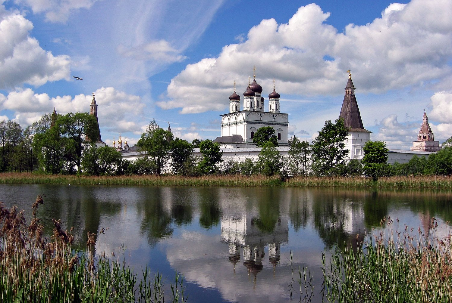 фото сделано летом 2006 года, через озеро